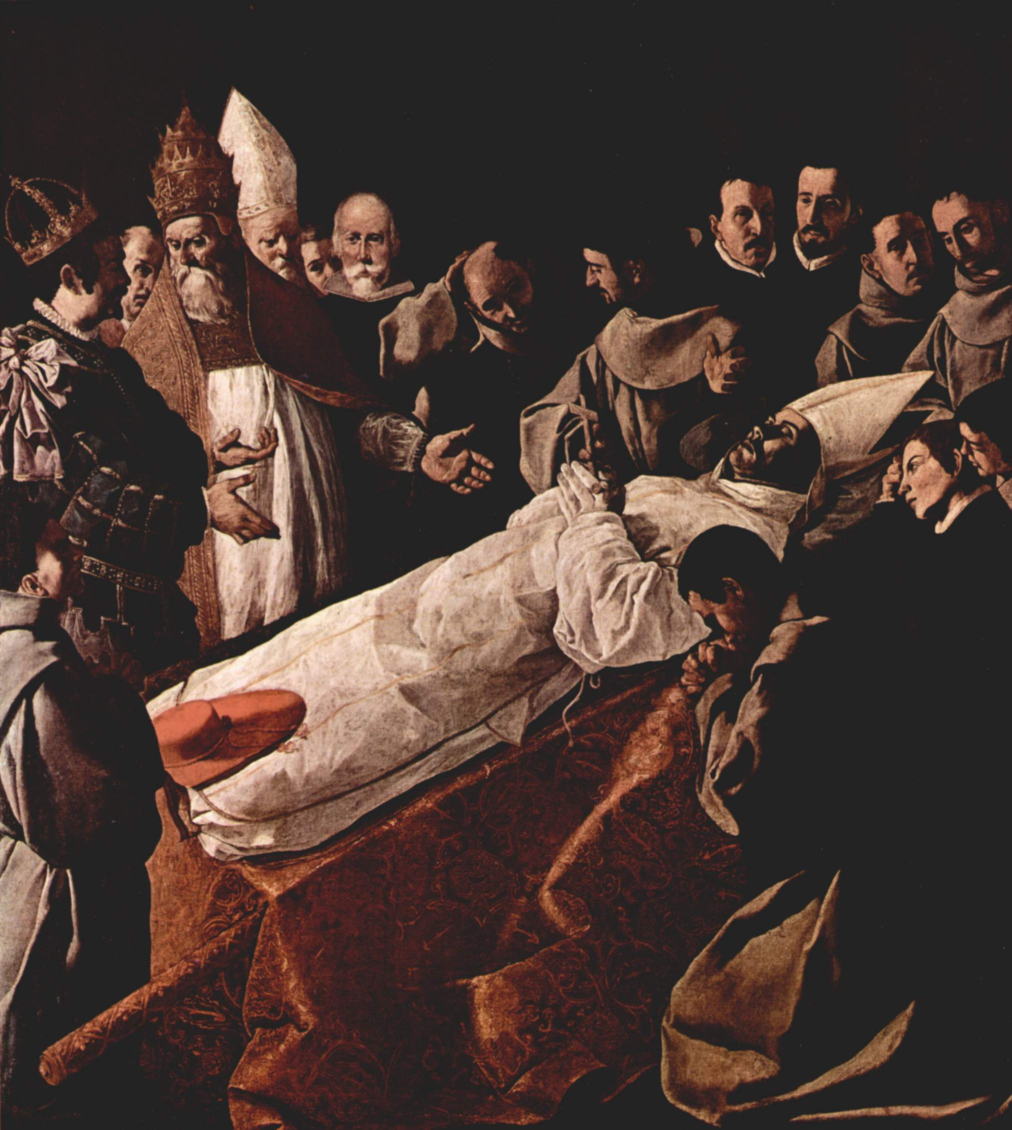 L'Exposition du corps de saint Bonaventure